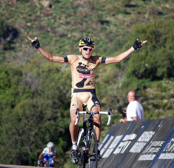 Rafael Valls ganando una etapa en el Tour San Luis